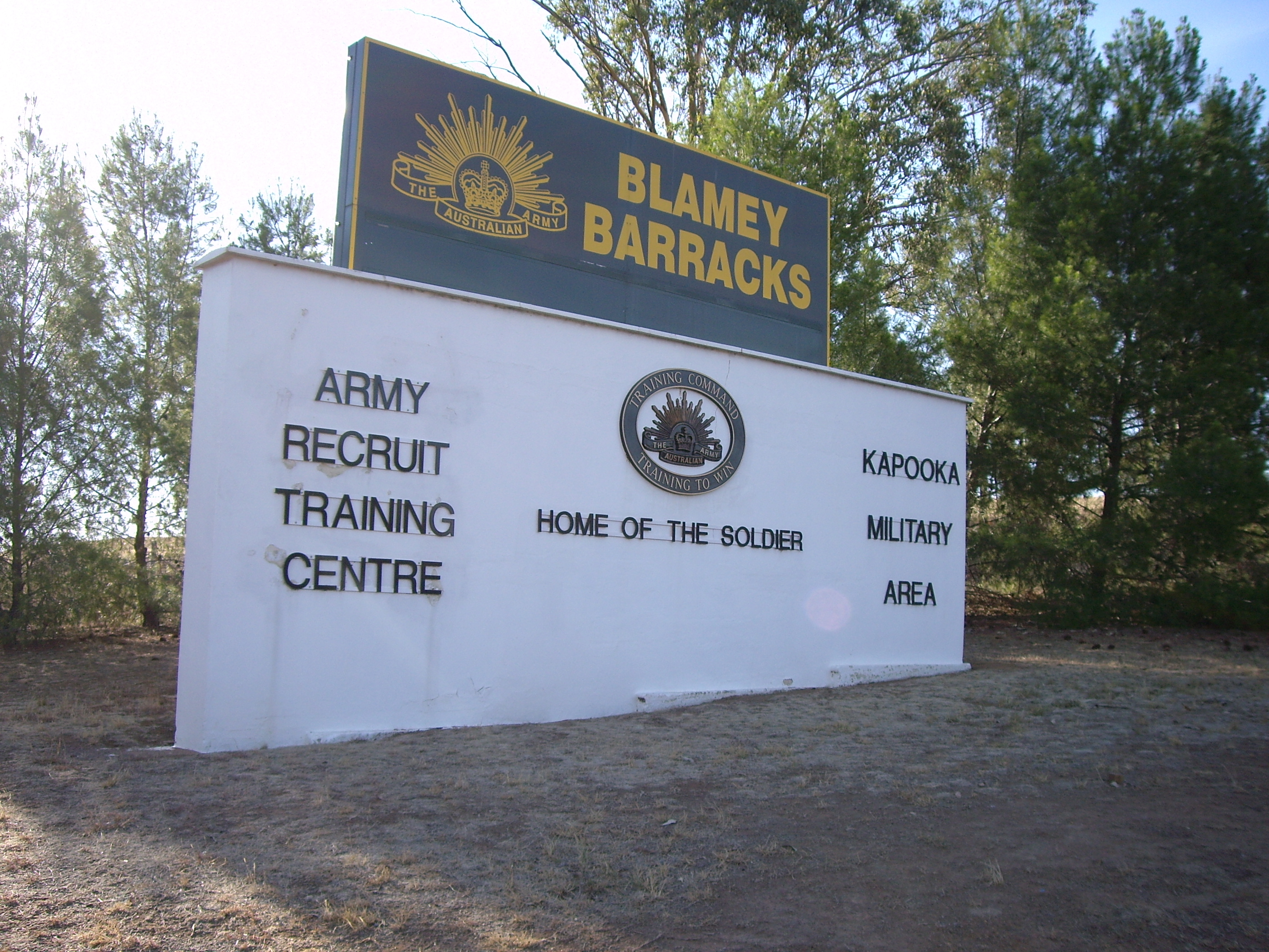 Army Recruit Training Centre entrance sign